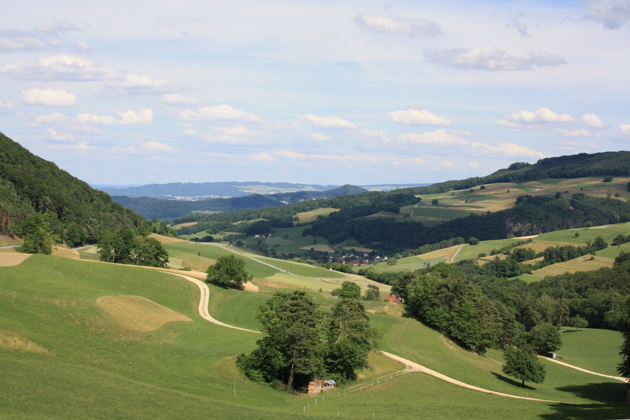 Blick ins Schenkenbergertal